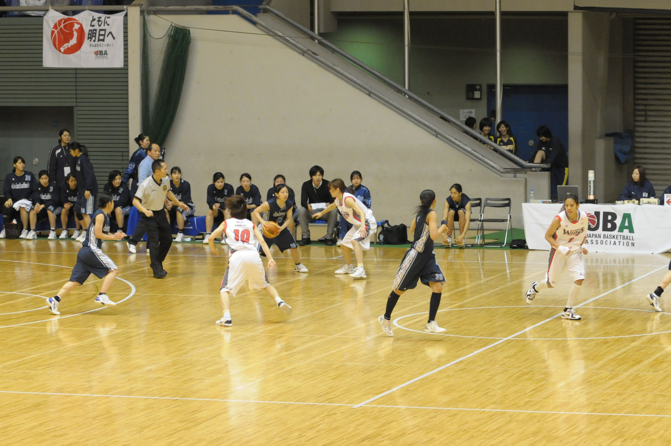 2013年全日本総合バスケットボール選手権大会2回戦、アイシン・エイ・ダブリュ ウィングス対愛知学泉大学。駒沢体育館で。